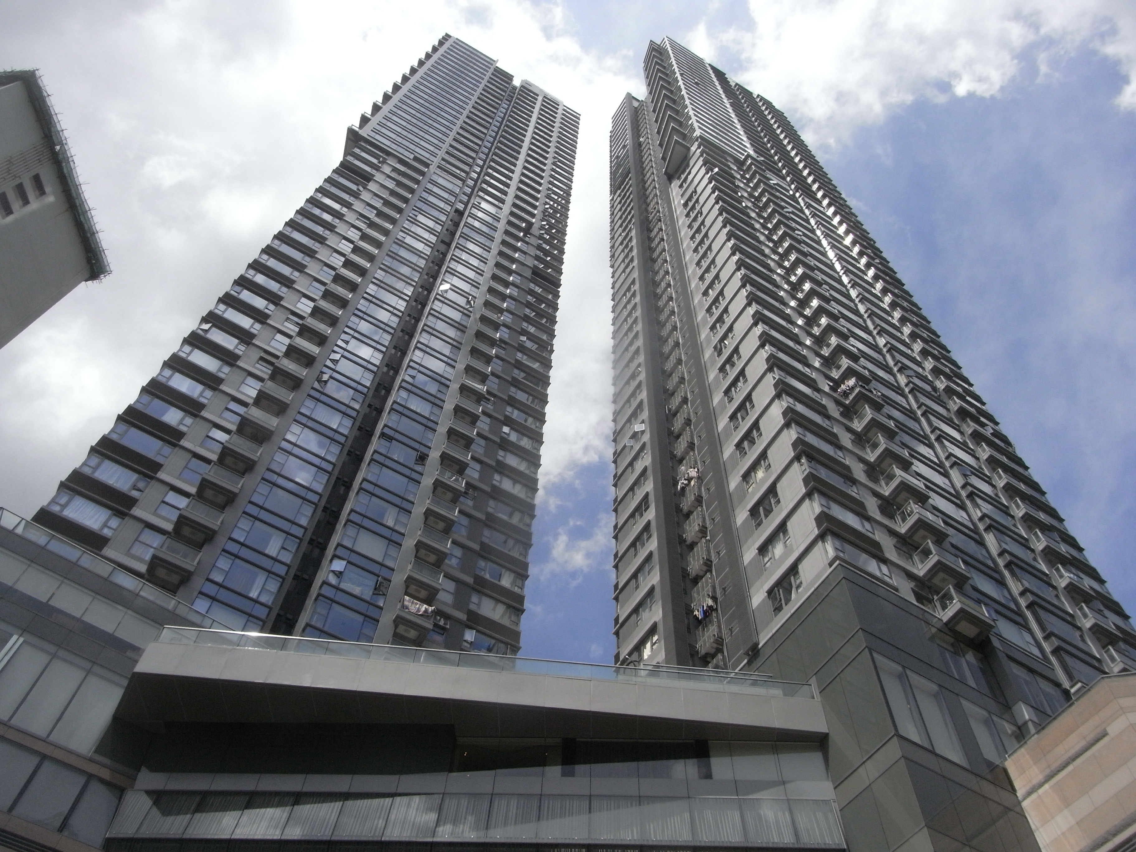 中文（香港）: 大坑上林